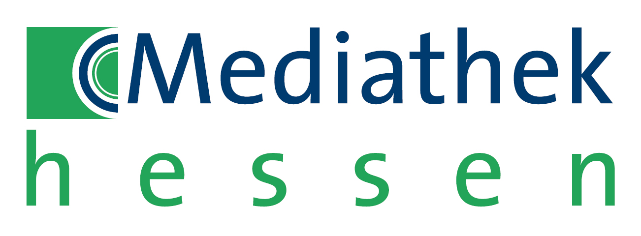 Logo Mediathek Hessen